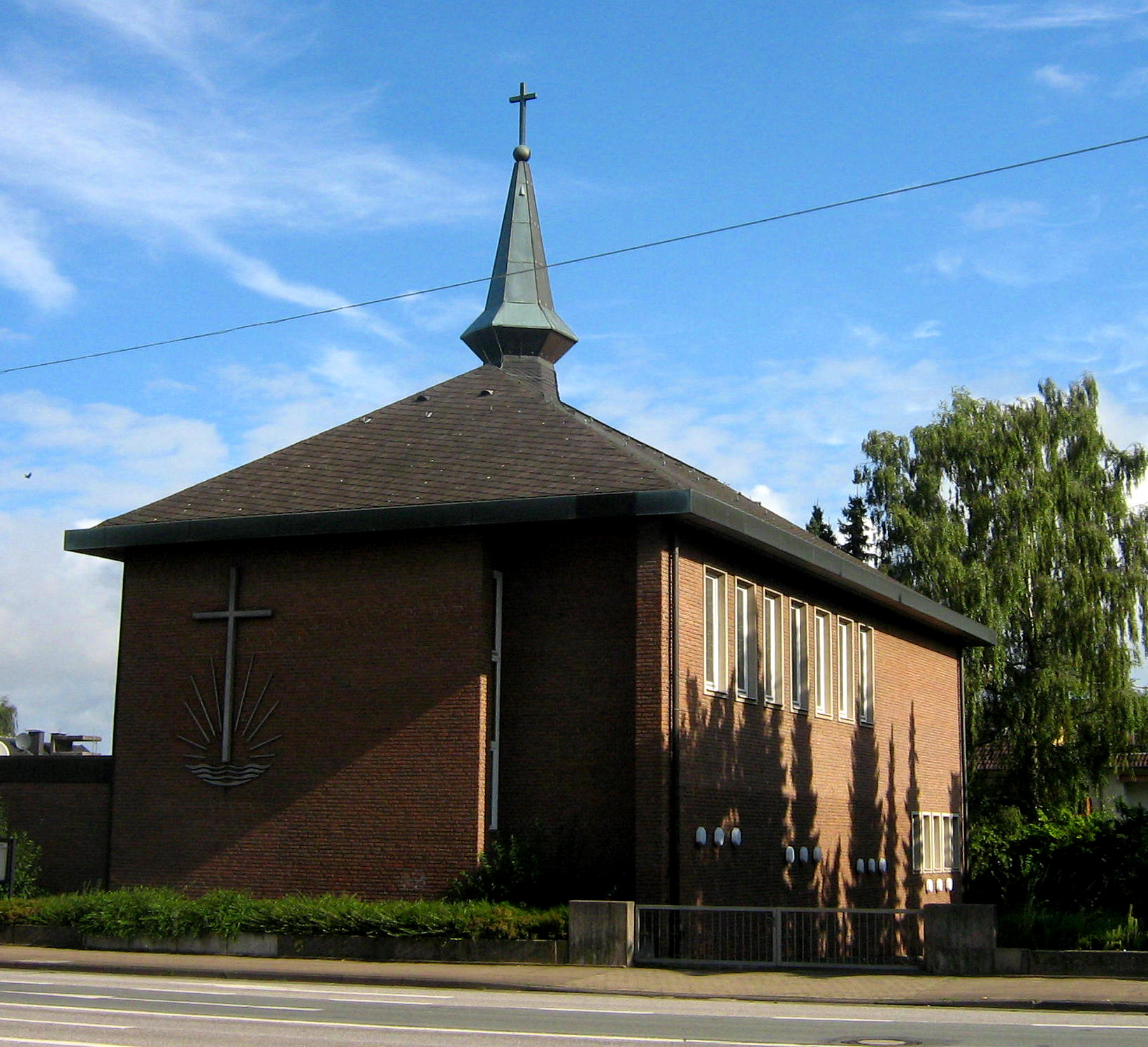 Ehemalige neuapostolische Kirche Bielefeld, Herforder Straße